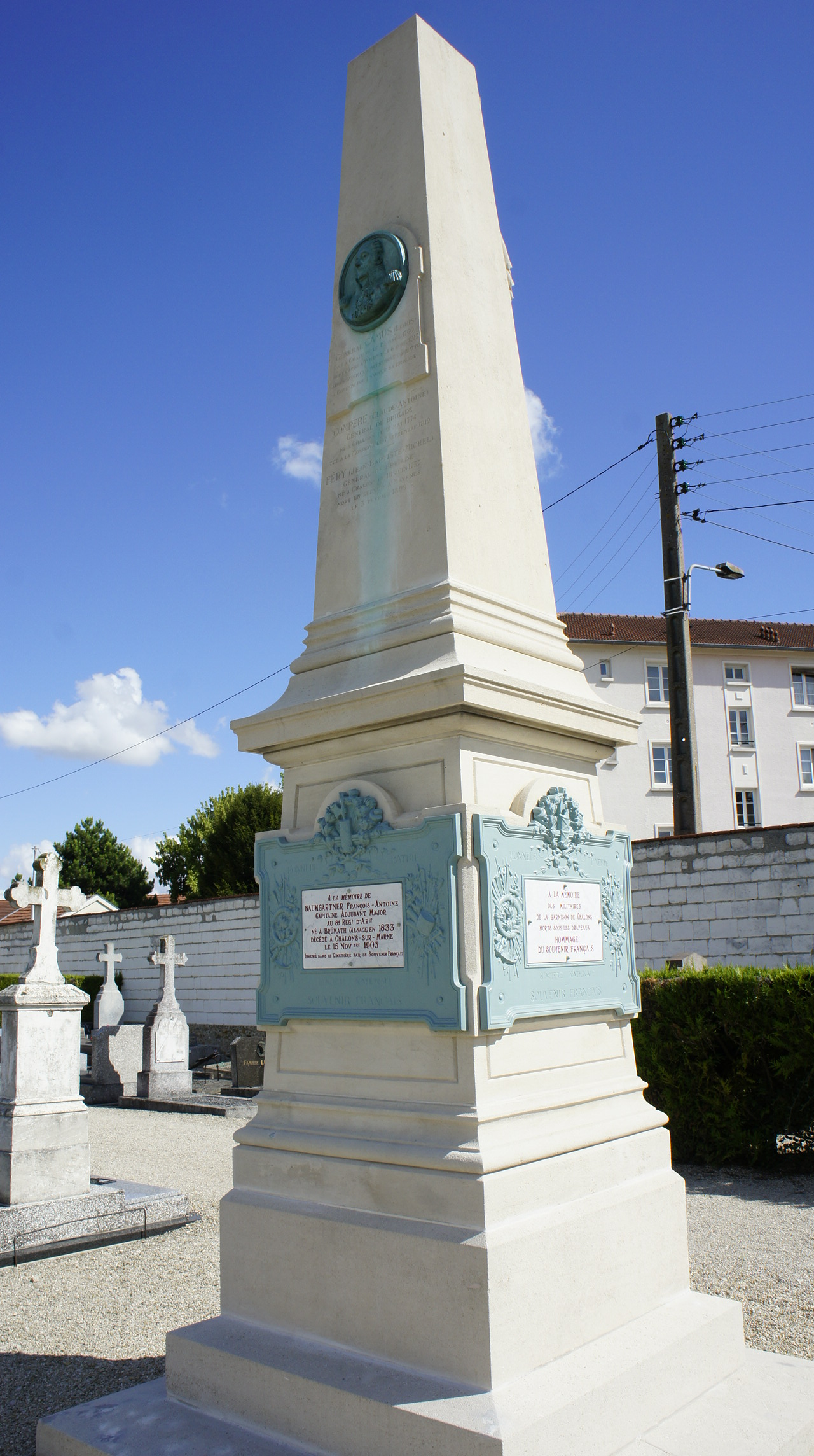 Colonne en hommage aux militaires célèbre de Châlons dans le cimetière de l'est, médaillon d eLouis camus.